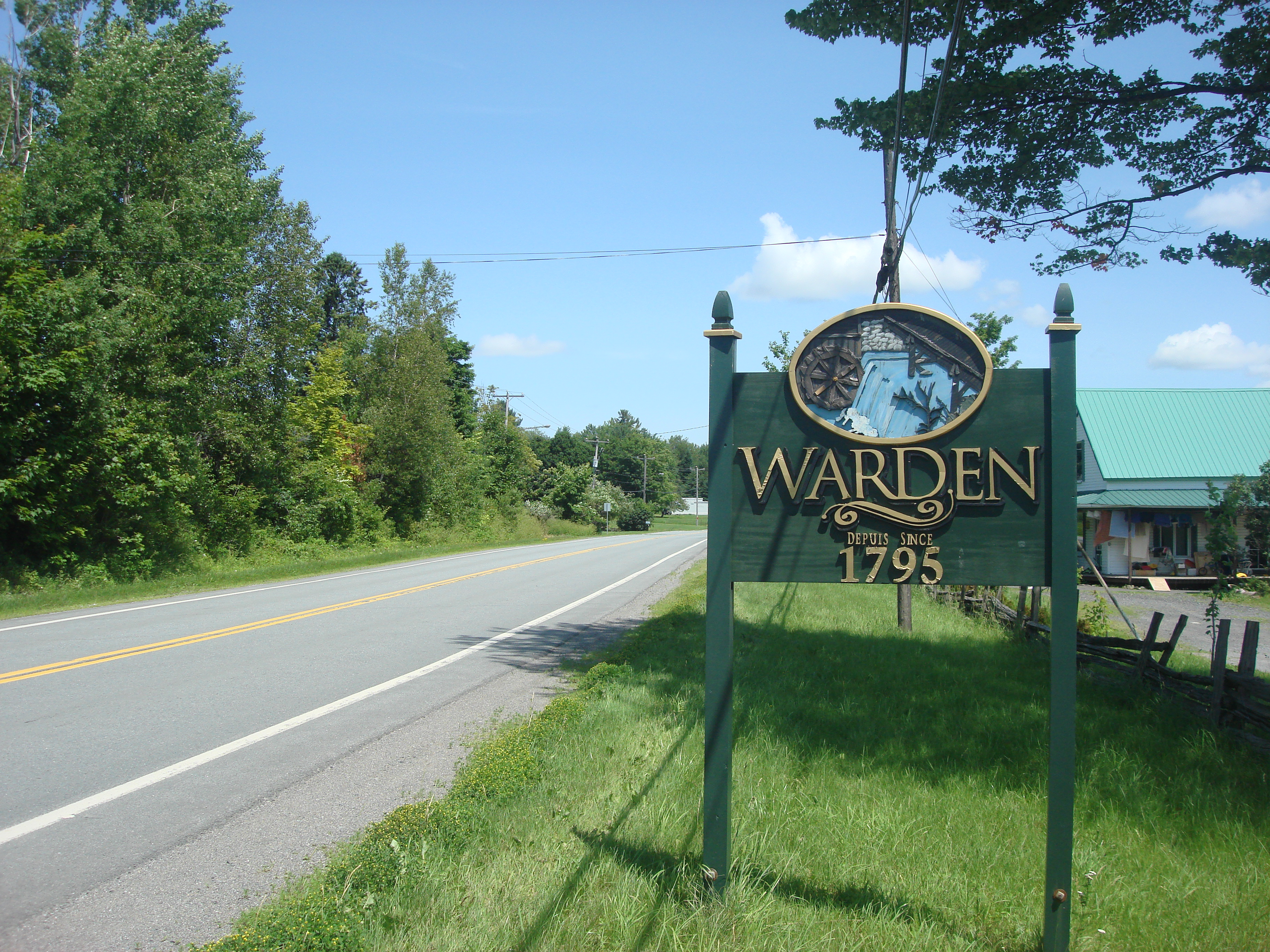 Bienvenue à Warden